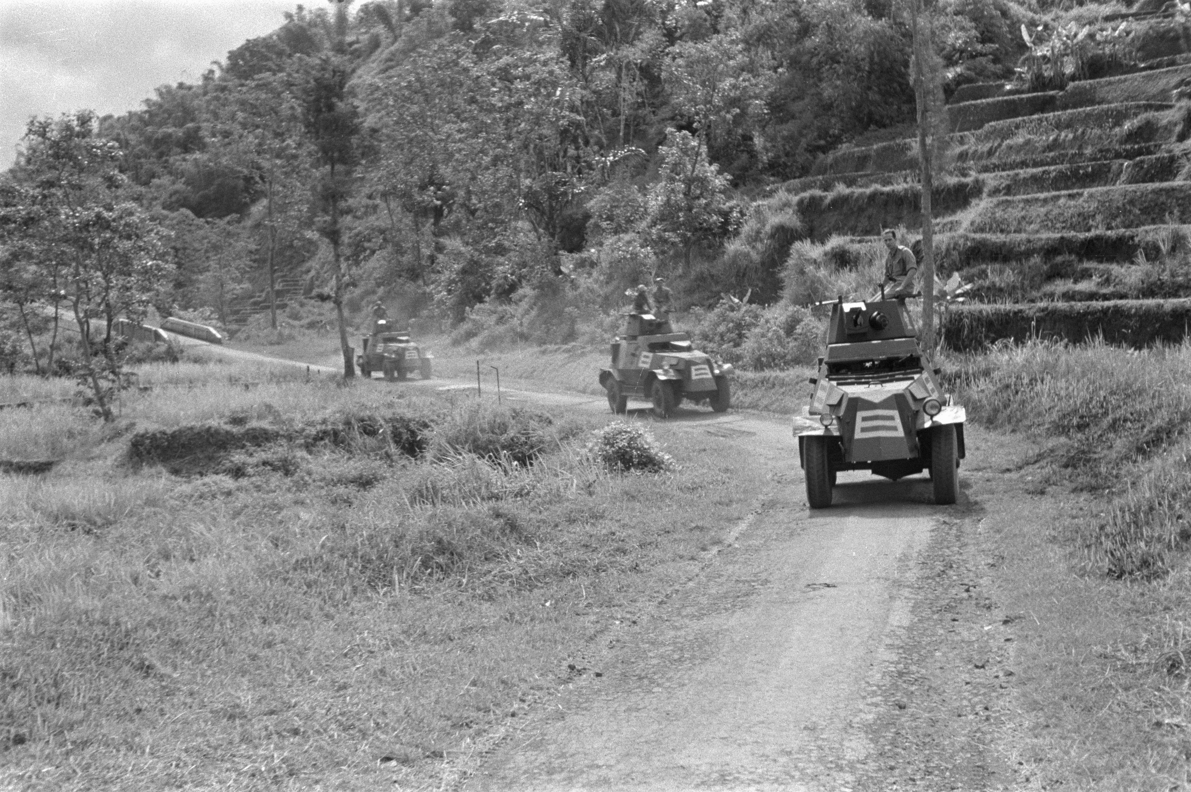 Collectie / Archief : Fotocollectie Dienst voor Legercontacten Indonesië Reportage / Serie : [DLC] Veteranen op de weg Beschrijving : [Pantserauto-peloton KNIL] Annotatie : Marmon-Herrington Pantserwagens Datum : juli 1947 Locatie : Indonesië, Nederlands-Indië Fotograaf : Fotograaf Onbekend / DLC Auteursrechthebbende : Nationaal Archief Materiaalsoort : Negatief (zwart/wit) Nummer archiefinventaris : bekijk toegang 2.24.04.02 Bestanddeelnummer : 4664